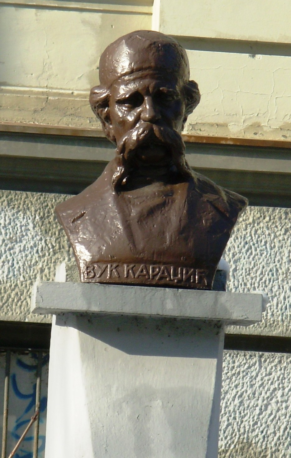 Биста Вука Караџића испред истоимене школе, код Ботаничке баште у Београду